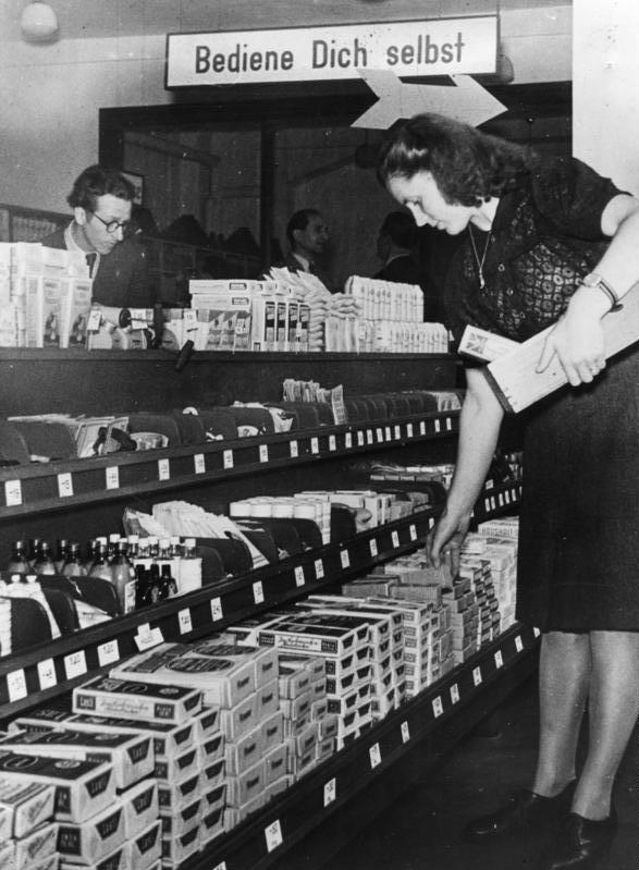 Augsburg, Erster Selbstbedienungsladen Bediene Dich selbst ... Die in zahlreichen europäischen Ländern, besonders aber in den USA weit verbreiteten Einzelhandelsgeschäfte mit Selbstbedienung wurden durch Errichtung eines "Blauen Ladens" zum ersten Mal durch die Grosshandelsfirma Müller in Augsburg auch in Deutschland versuchsweise eingeführt. Diese schnelle und billige Verkaufsmethode soll auch den deutschen Einzelhandel gegenüber evtl. neu entstehenden ausländischen Geschäften konkurrenzfähig halten. Werden die Langfinger widerstehen können? 22-6-49 Illus-dpd 3493-49